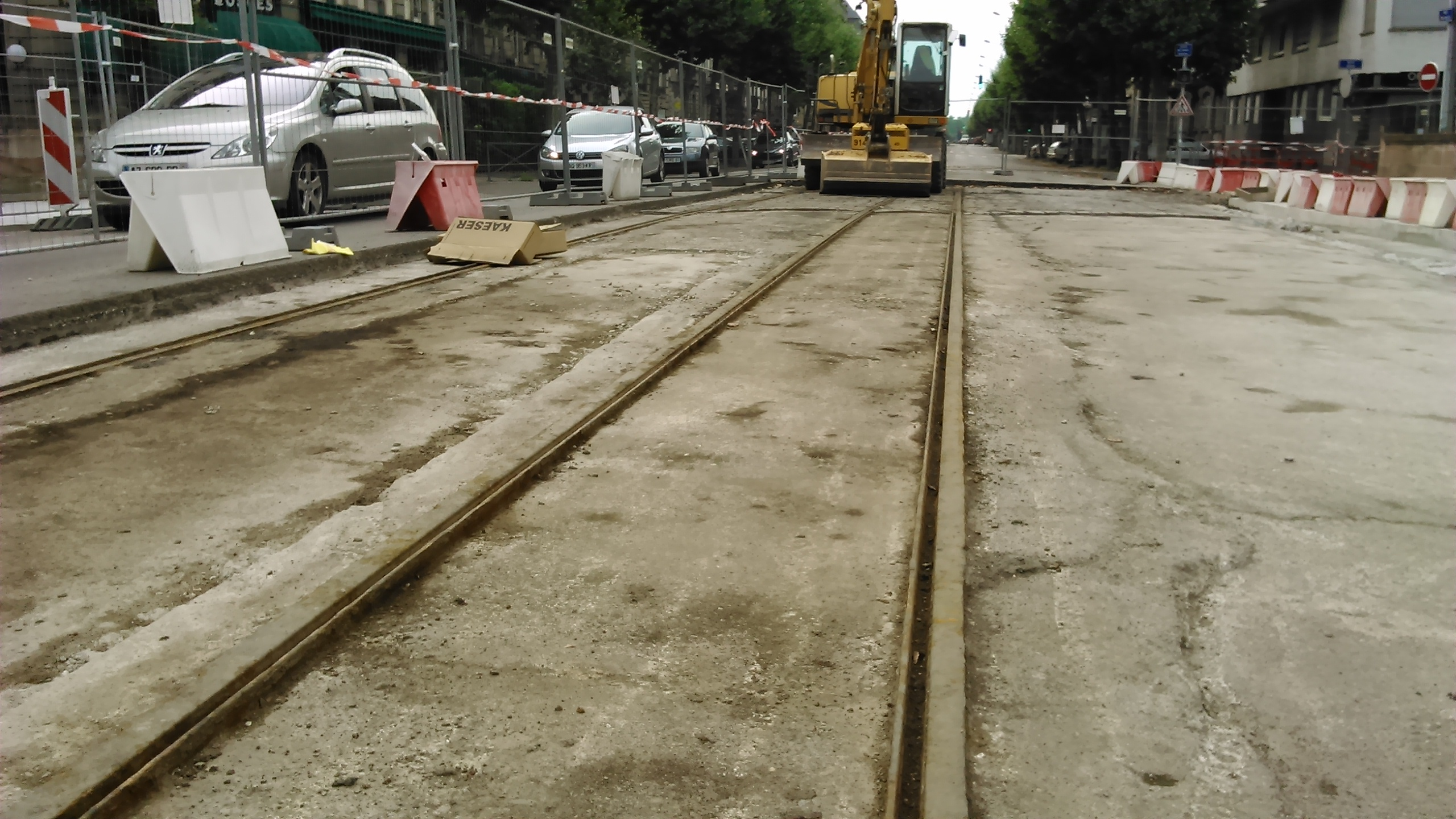 Rails de l'ancien tramway de Strasbourg sur le Pont des Vosges mis à jour au cours d'un chantier en juillet 2014